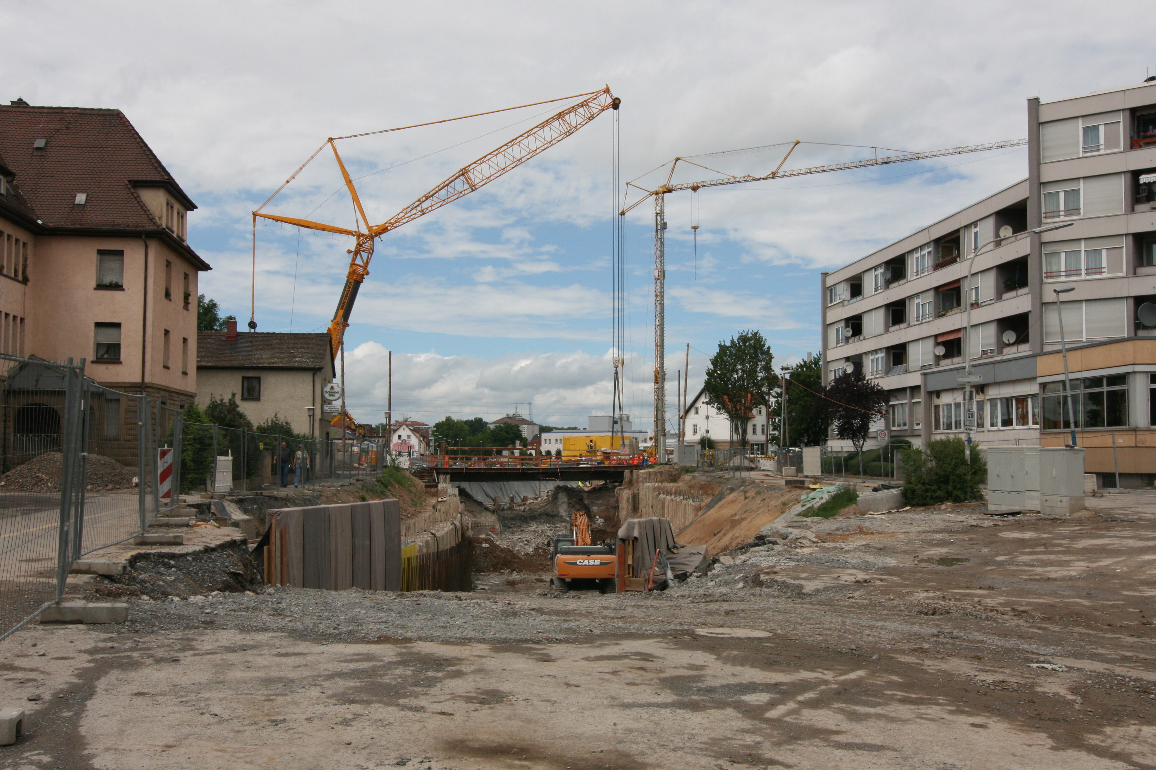 Einsetzung einer Hilfsbrücke bei der Großbaustelle Unterführung Sülmertor des Bauvorhabens Stadtbahn Nord in Heilbronn